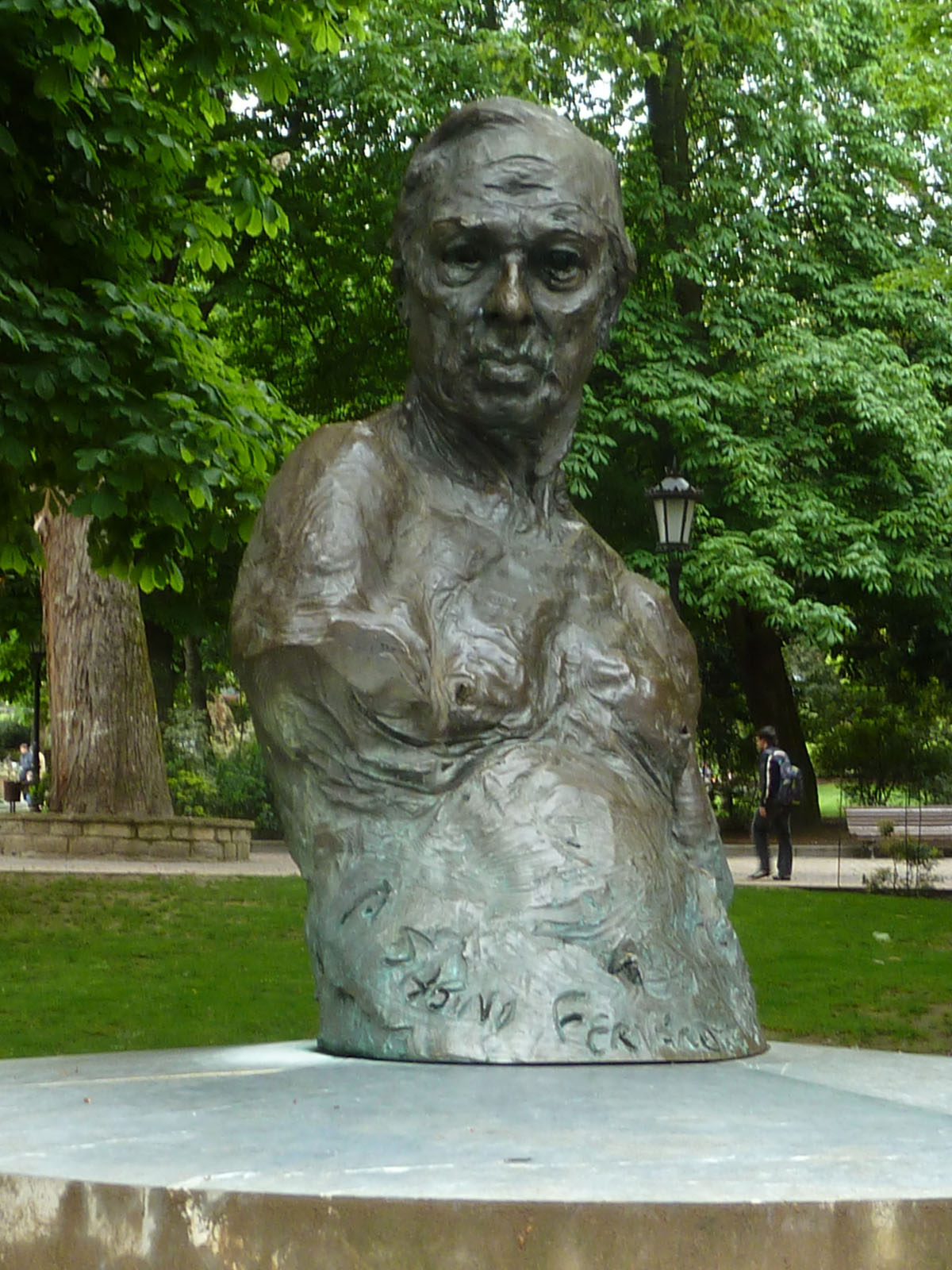 Oviedo